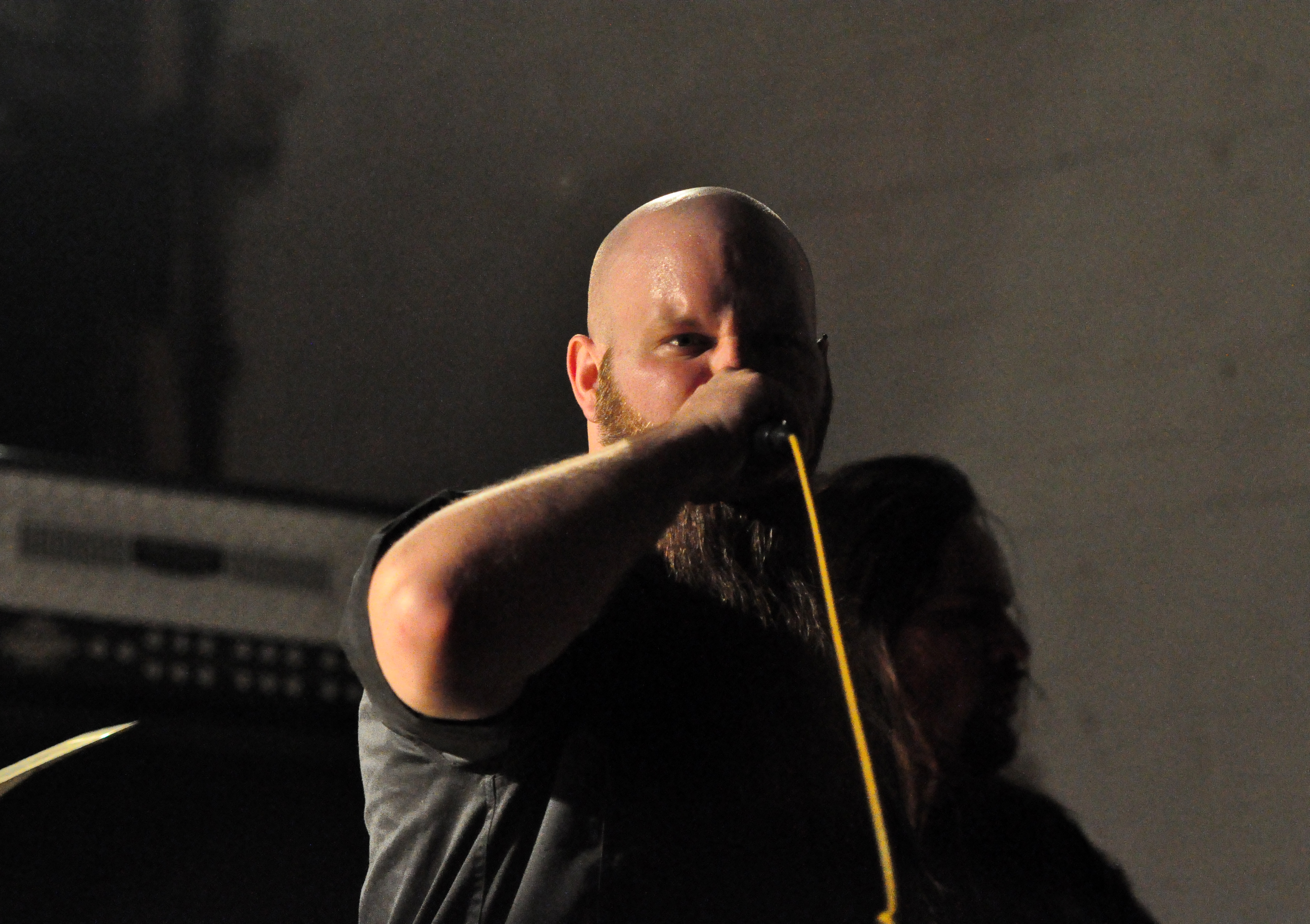 Jost Kleinert from Lay Down Rotten